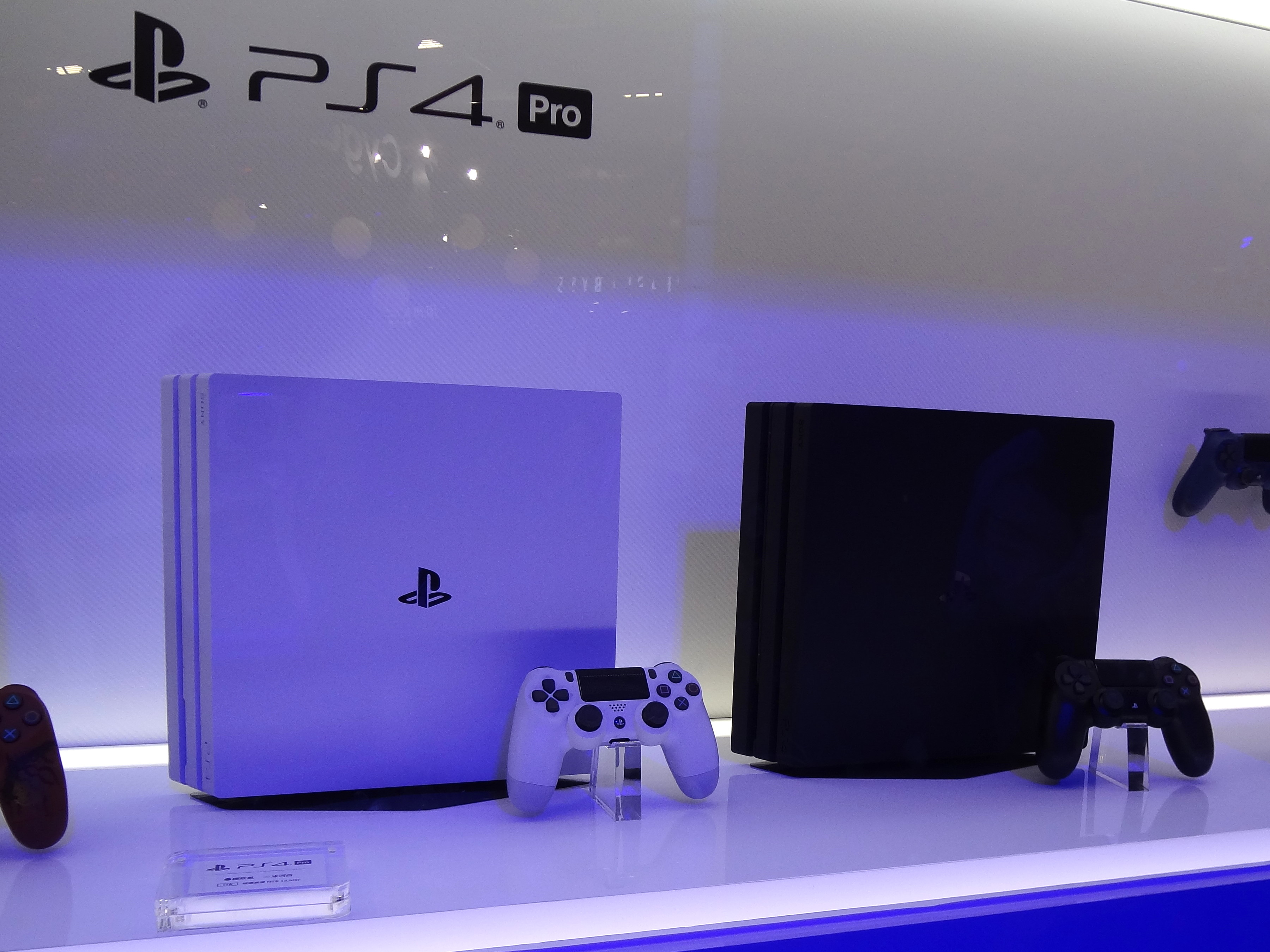 2018台北國際電玩展，台灣索尼互動娛樂攤位，PlayStation 4 Pro展示品。